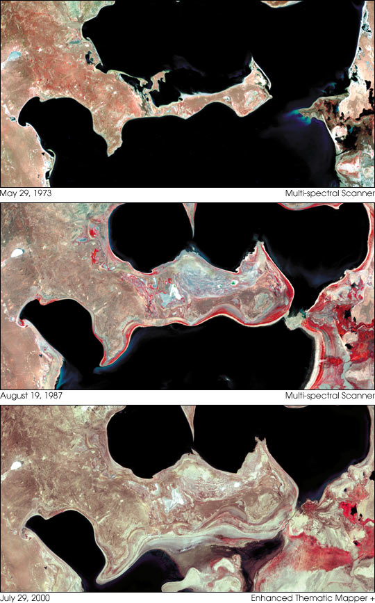 Aral See